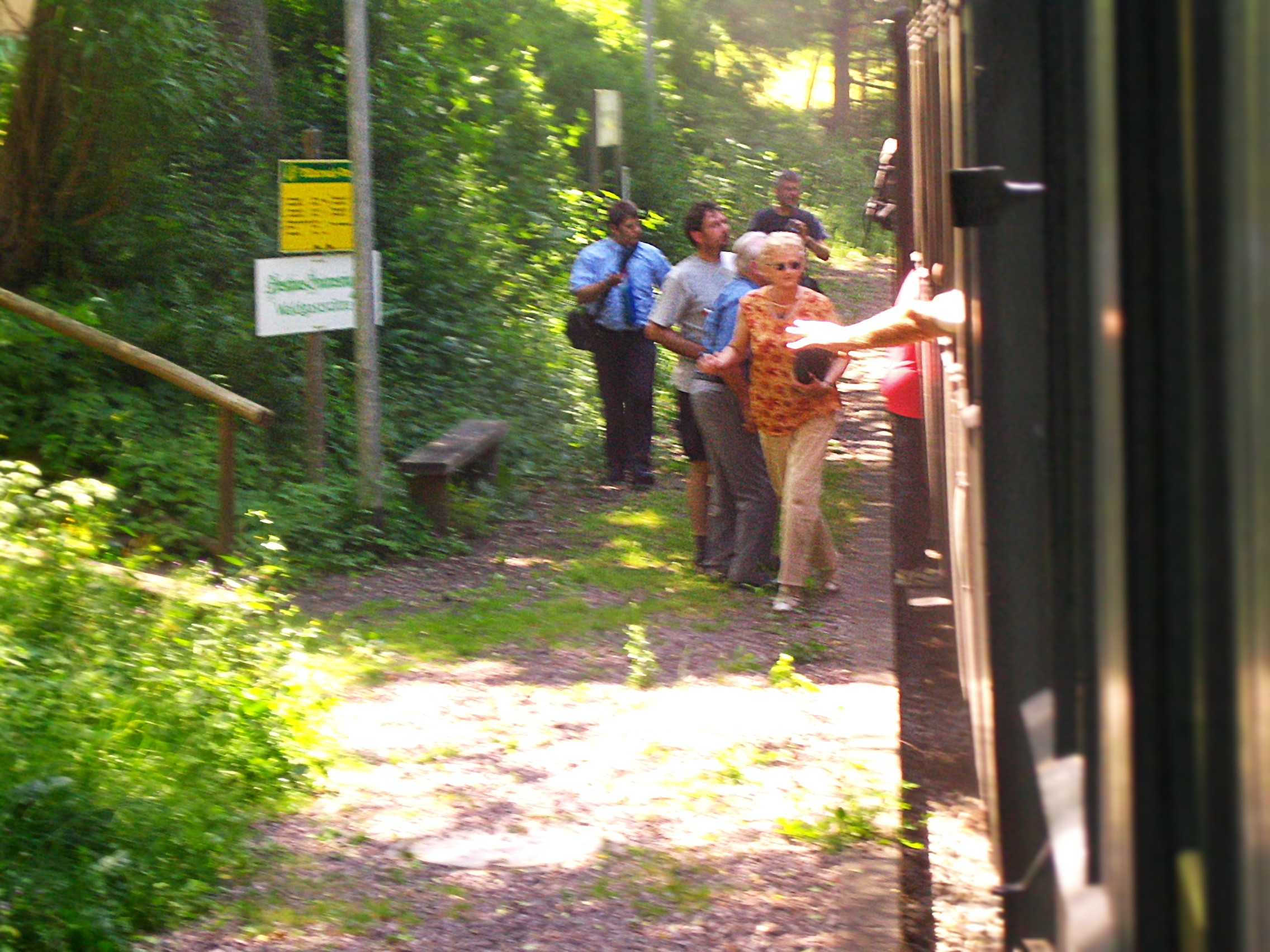 Fahrgastwechel beim Kuckucksbähnel in Breiten